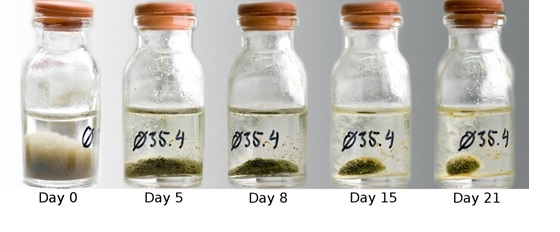 Temporal progression of photogranulation under static conditions.